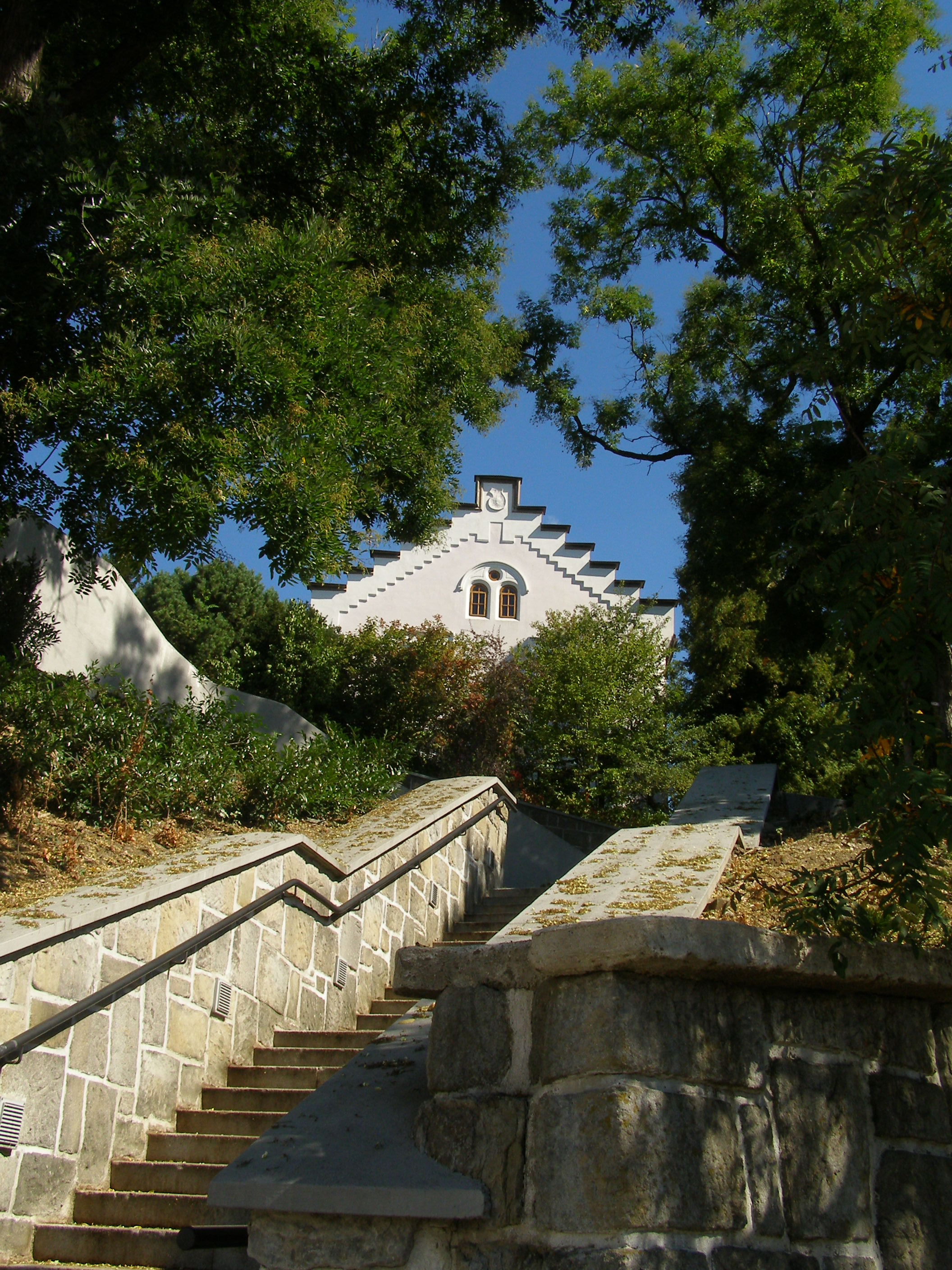 Fara evangelická (Vsetín), Palackého 156, Vsetín